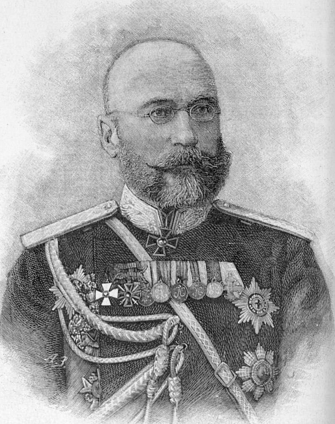 Гродеков Николай Иванович